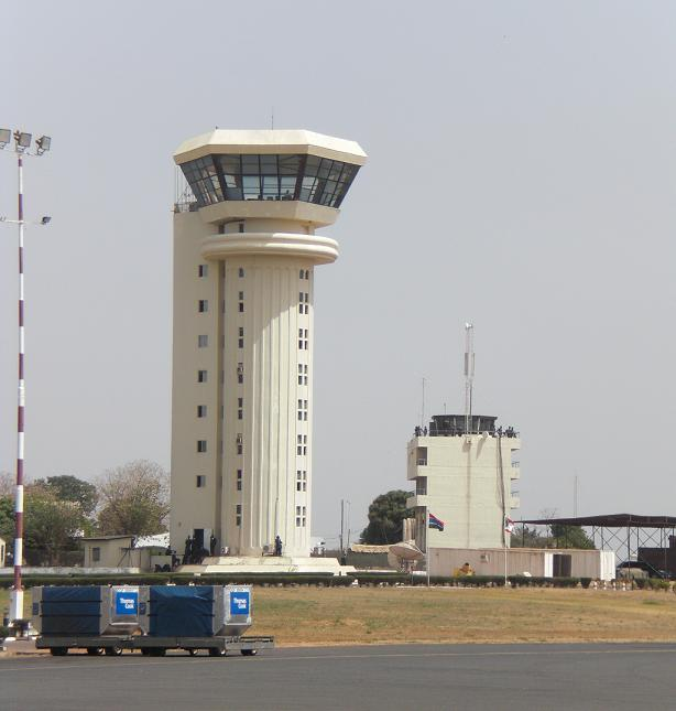 Nuova e vecchia torre di controllo all'aeroporto intenazionale di Banjul. Feb 2009.